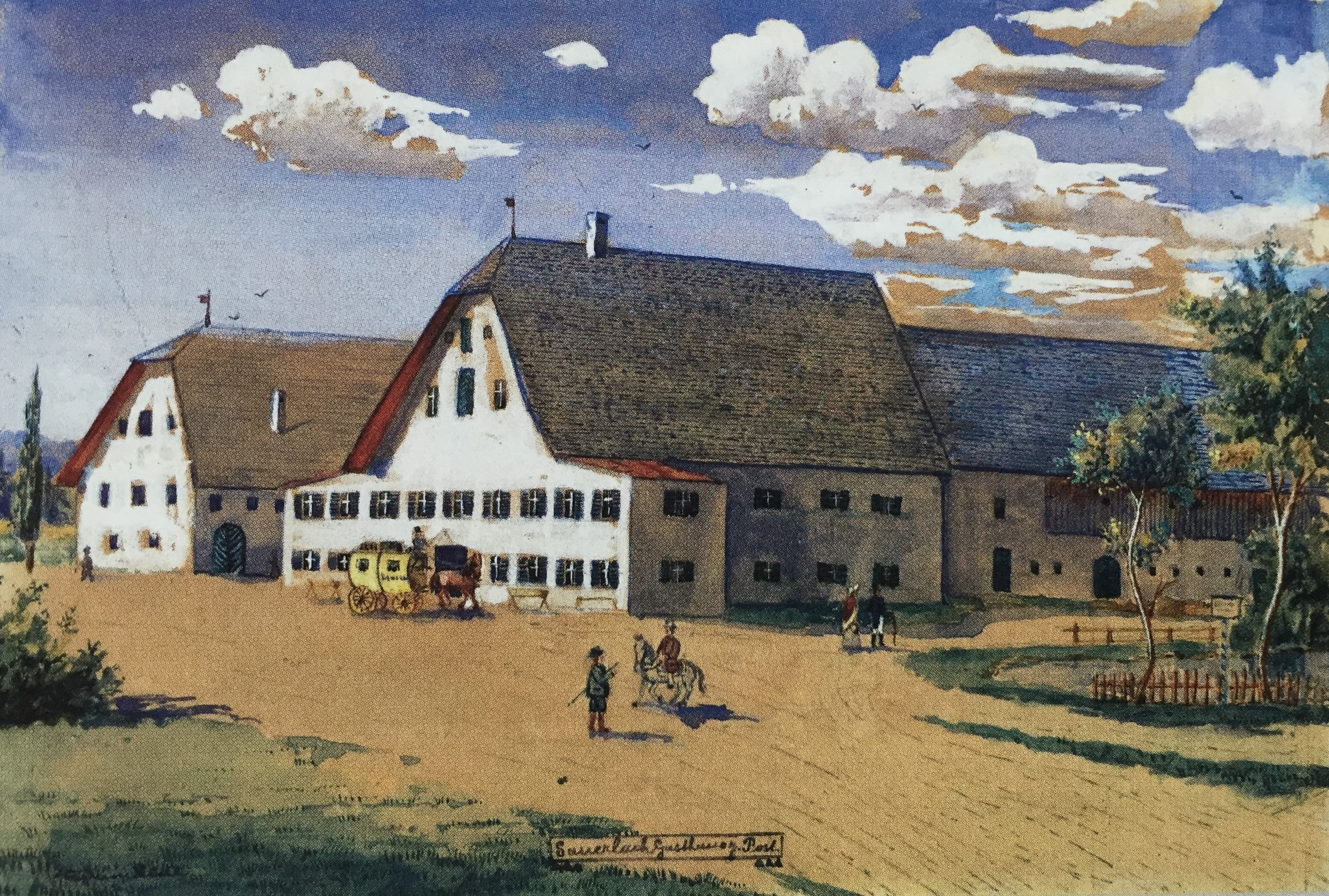 Gemälde von Emeran Lidl aus dem Jahre 1899, nach einer alten flüchtig gezeichneten Skizze von Therese Kothmüller, geb. Lidl